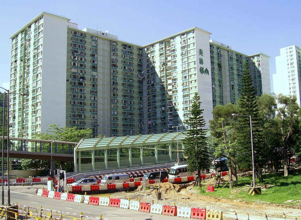 中文（香港）: 美林邨美楓樓